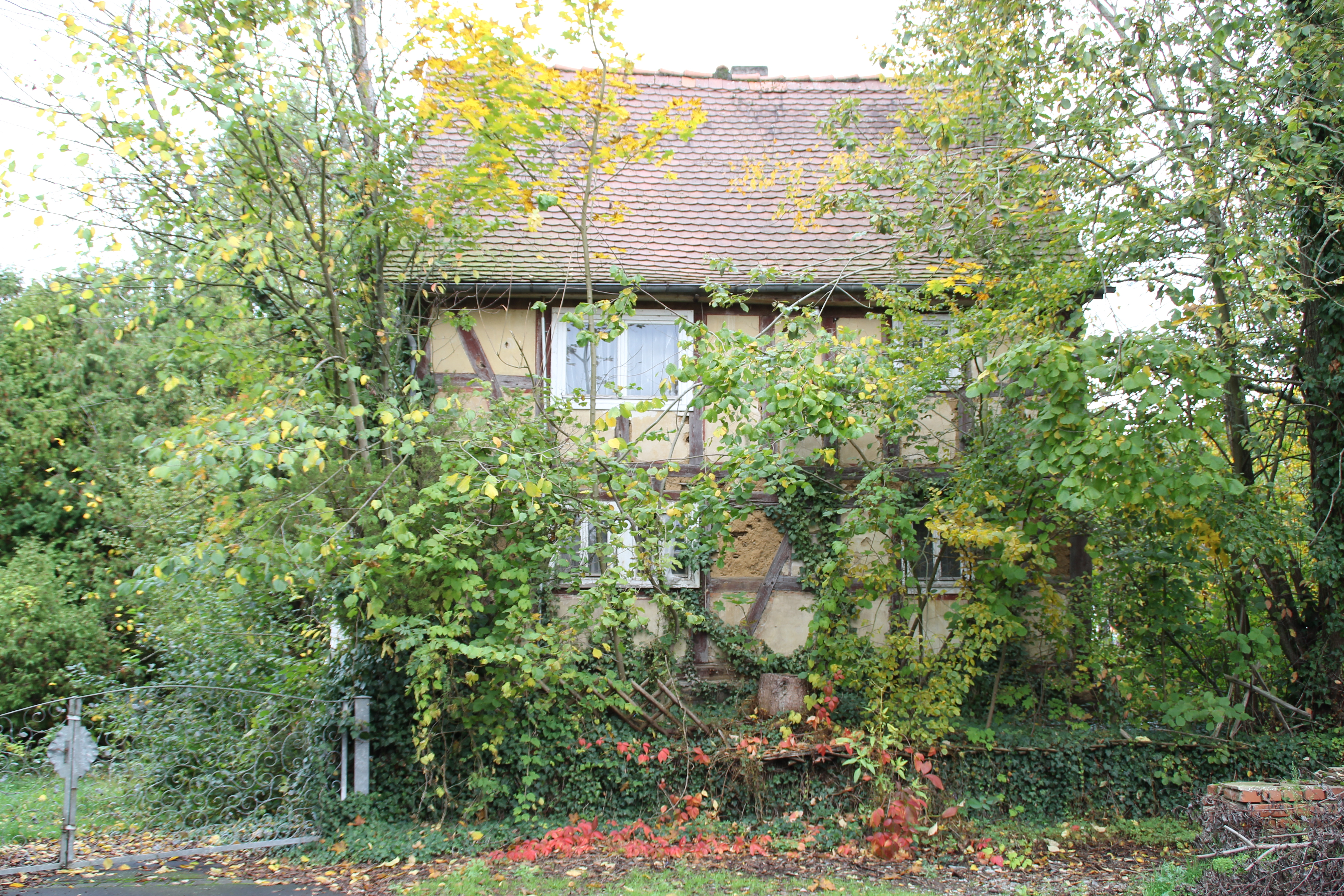 Das Wohnhaus der ehem. Wenzelsmühle (Ölmühle Mömbris) im Jahr 2019